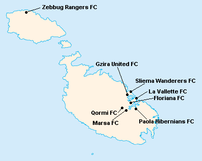 Répartition des clubs en First Division Maltaise 1970-1971.